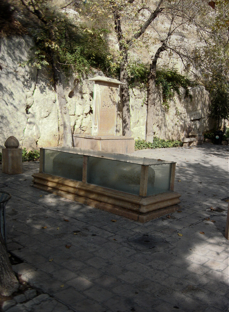 Tomb of Khaju Kermani, Shiraz